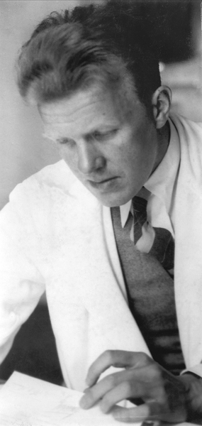 portrett, mann, overlege, direktør, brystbilde.